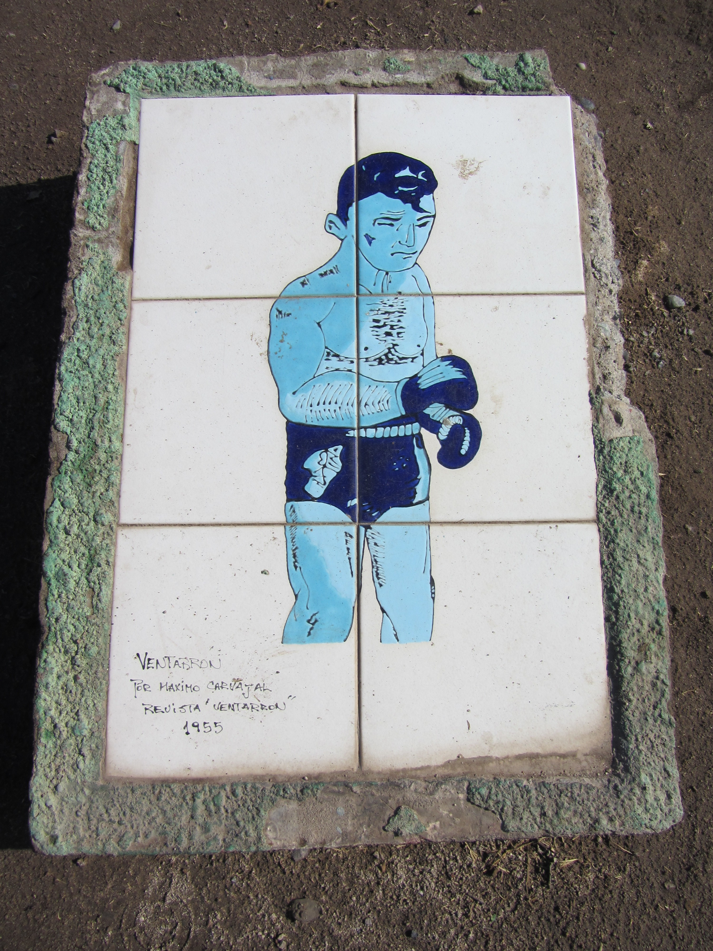 Parque del Cómic